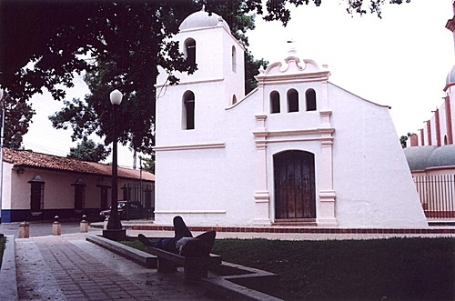 fotografia